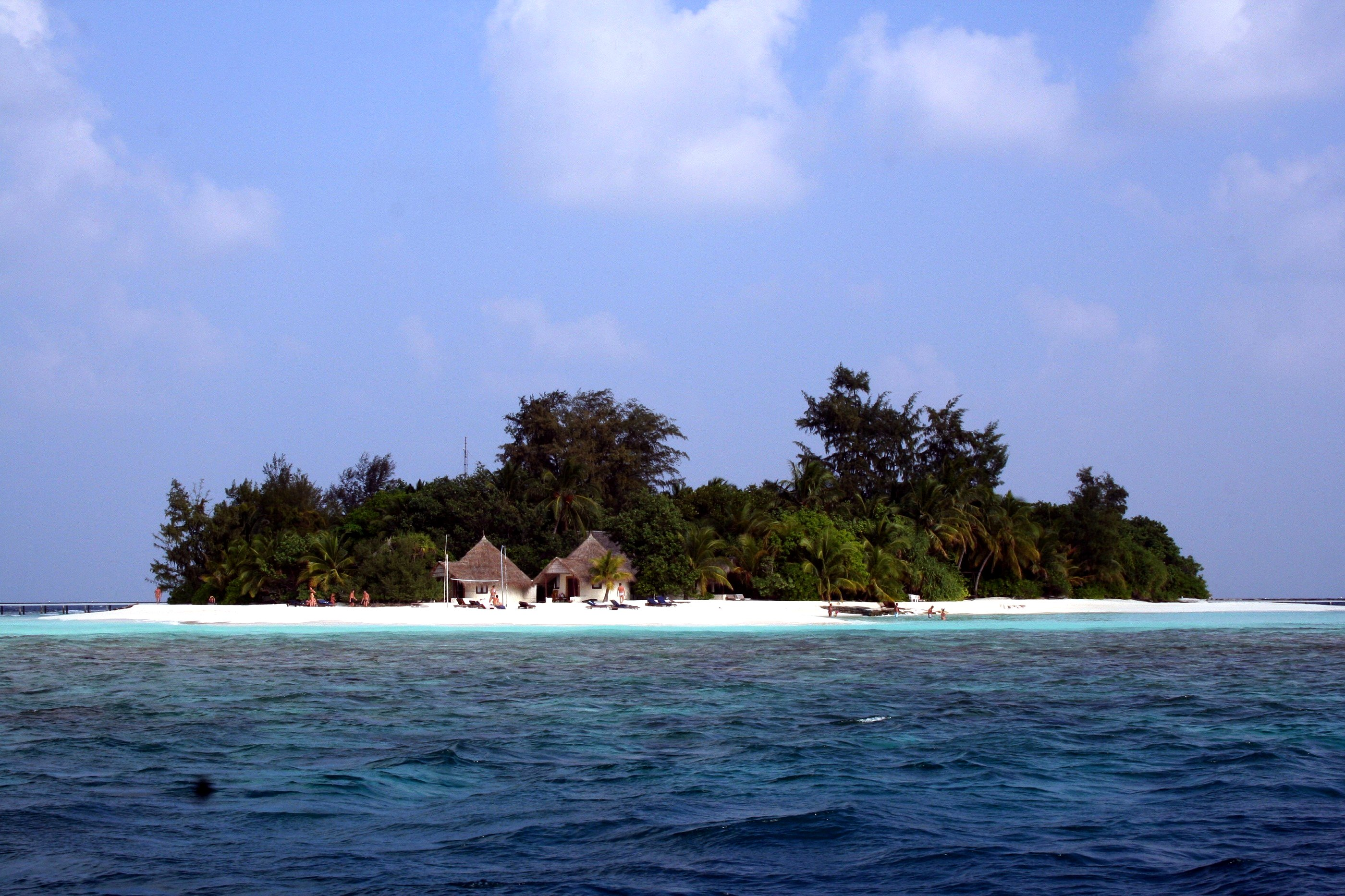 Bathala